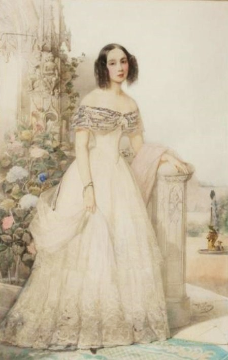 Александра Петровна Челищева, урожденная княжна Хованская (1813—1889), в первом браке была за генерал-майором, гофмаршалом И. П. Вешняковым.